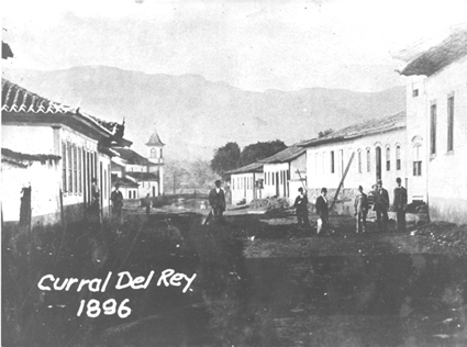 Arraial de Nossa Senhora da Boa Viagem de Curral del Rey, em 1896